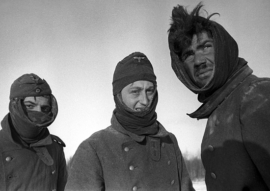 Контрнаступление советских войск под Москвой (1941)